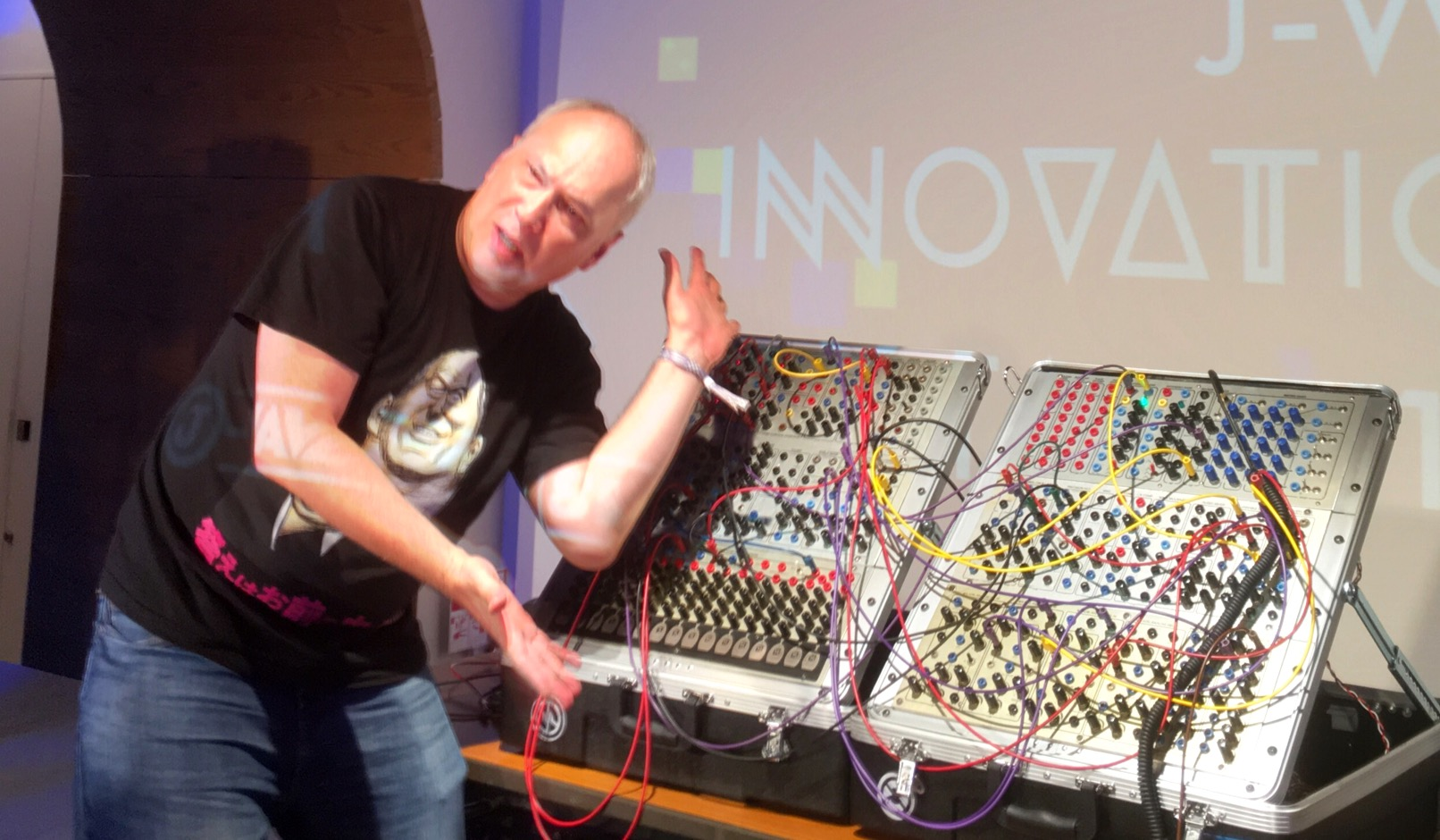 モーリー・ロバートソン（Morley Robertson)